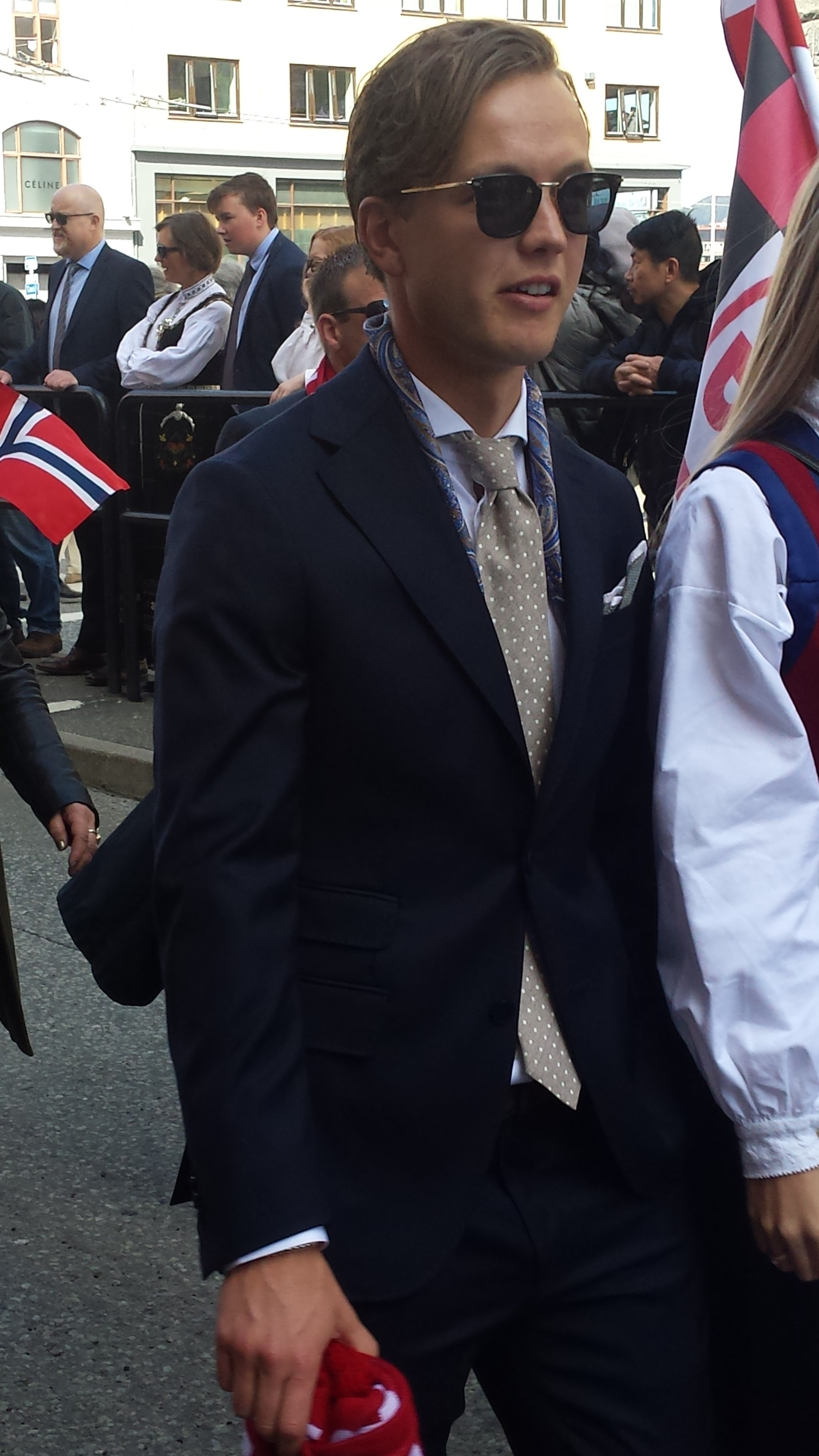 Fredrik Haugen